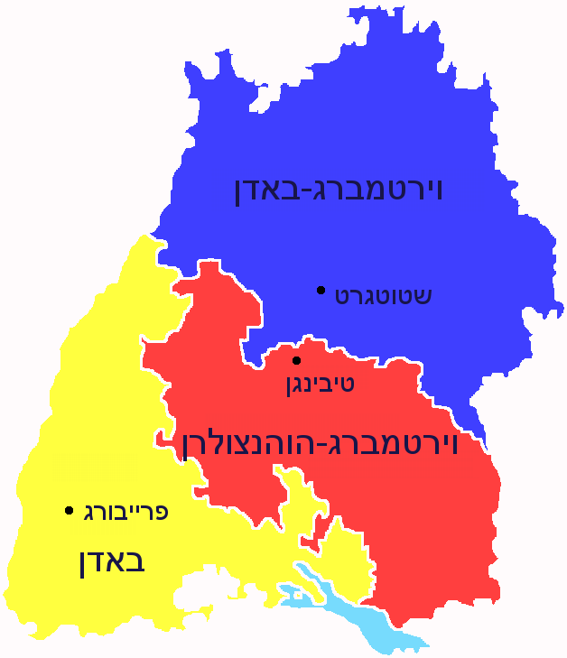 בדן וירטנברג Württemberg-Baden (Q251660) Baden (Q261407) Württemberg-Hohenzollern (Q262733) Lake Constance (Q4127)